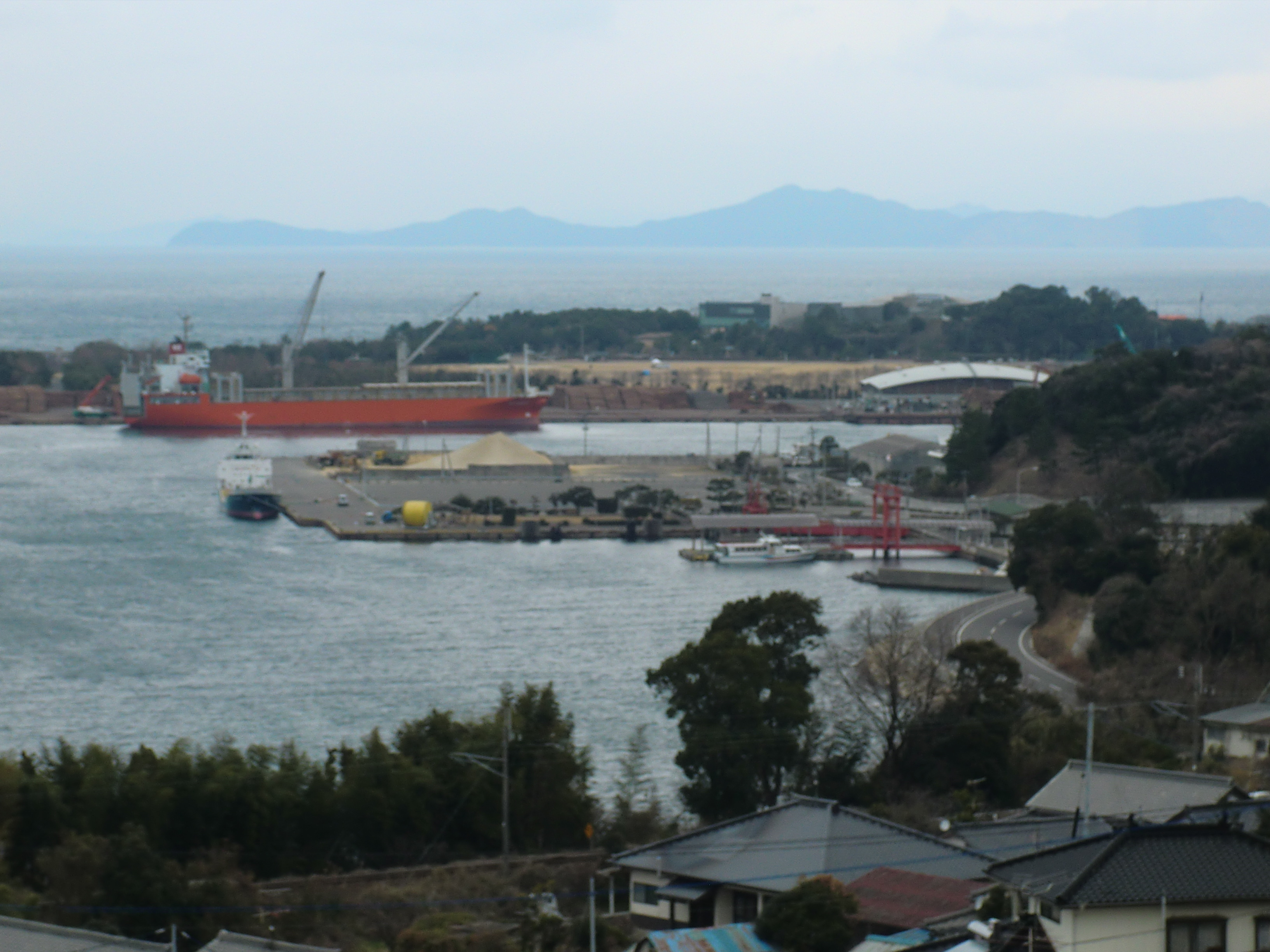 水俣港。月浦ふれあい公園から撮影。